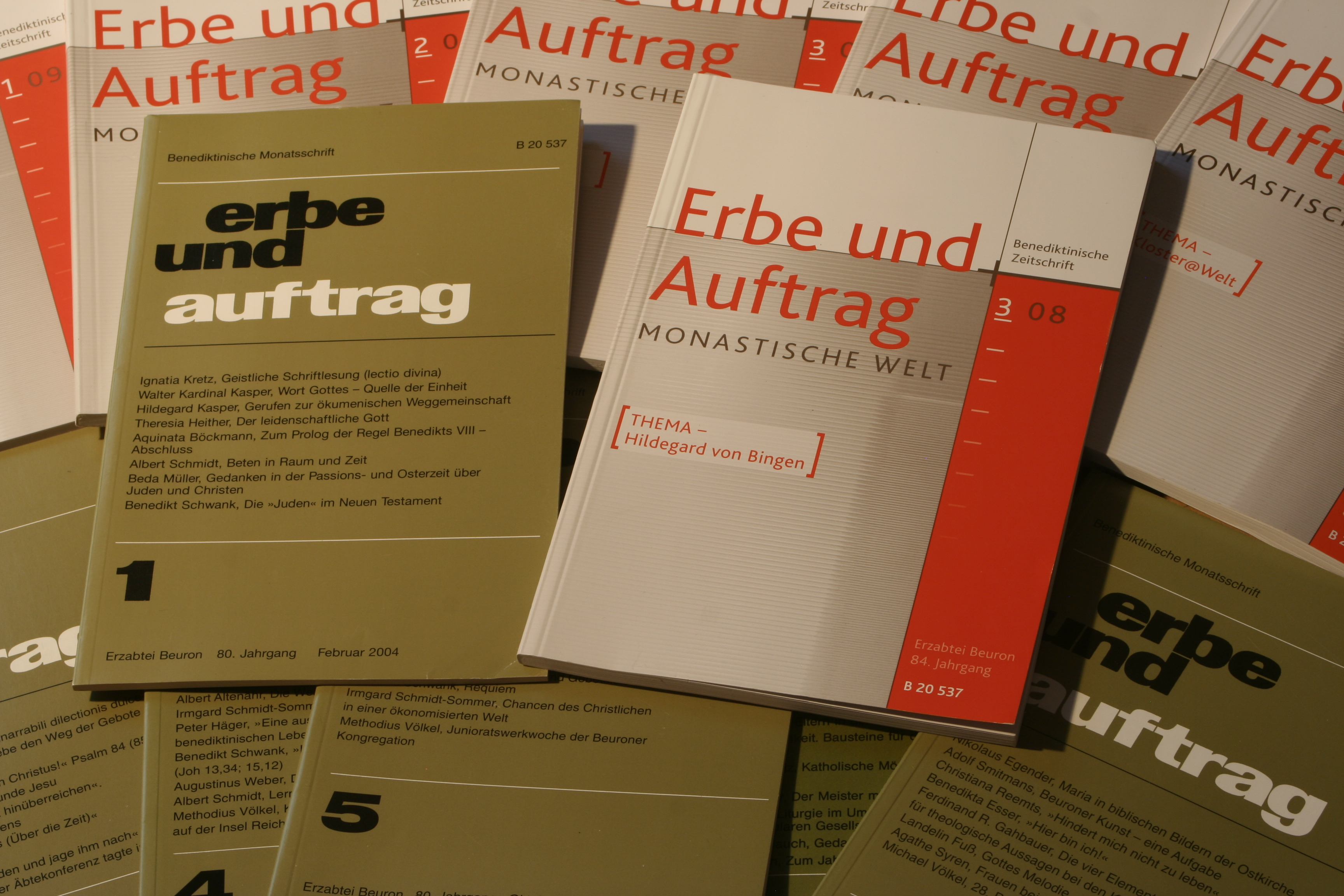 Die Benediktinische Zeitschrift Erbe und Auftrag im alten grünen Design und im neuen rot-grau-weißen Design